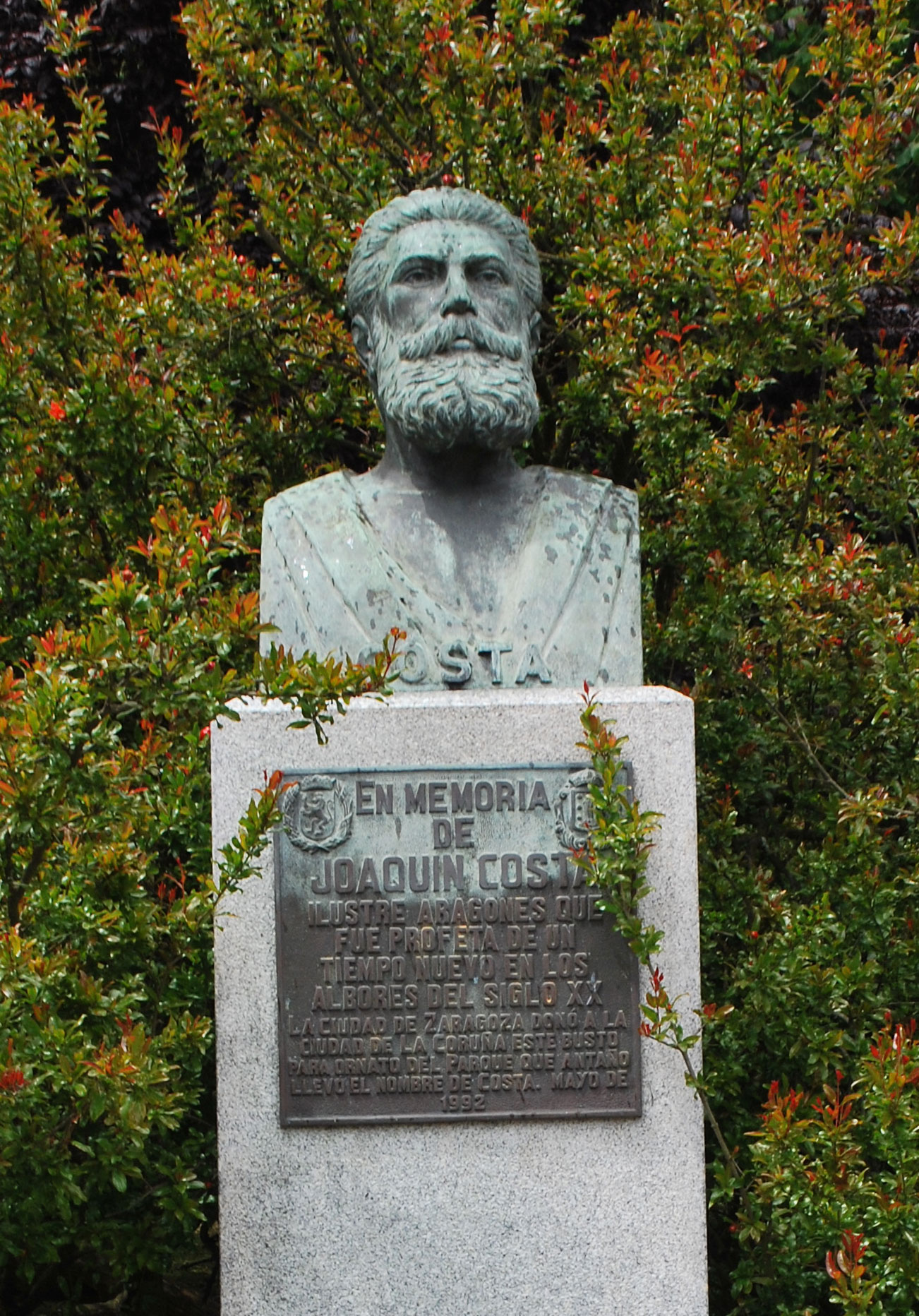 Homenaxe a Joaquín Costa no parque de santa Margarida A Coruña Galiza Spain